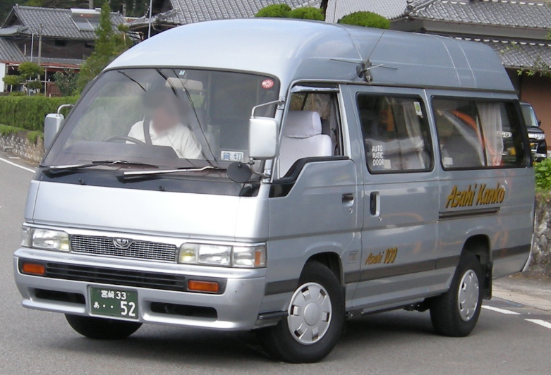 あさひ観光（宮崎県） 北方町福祉バスの車両